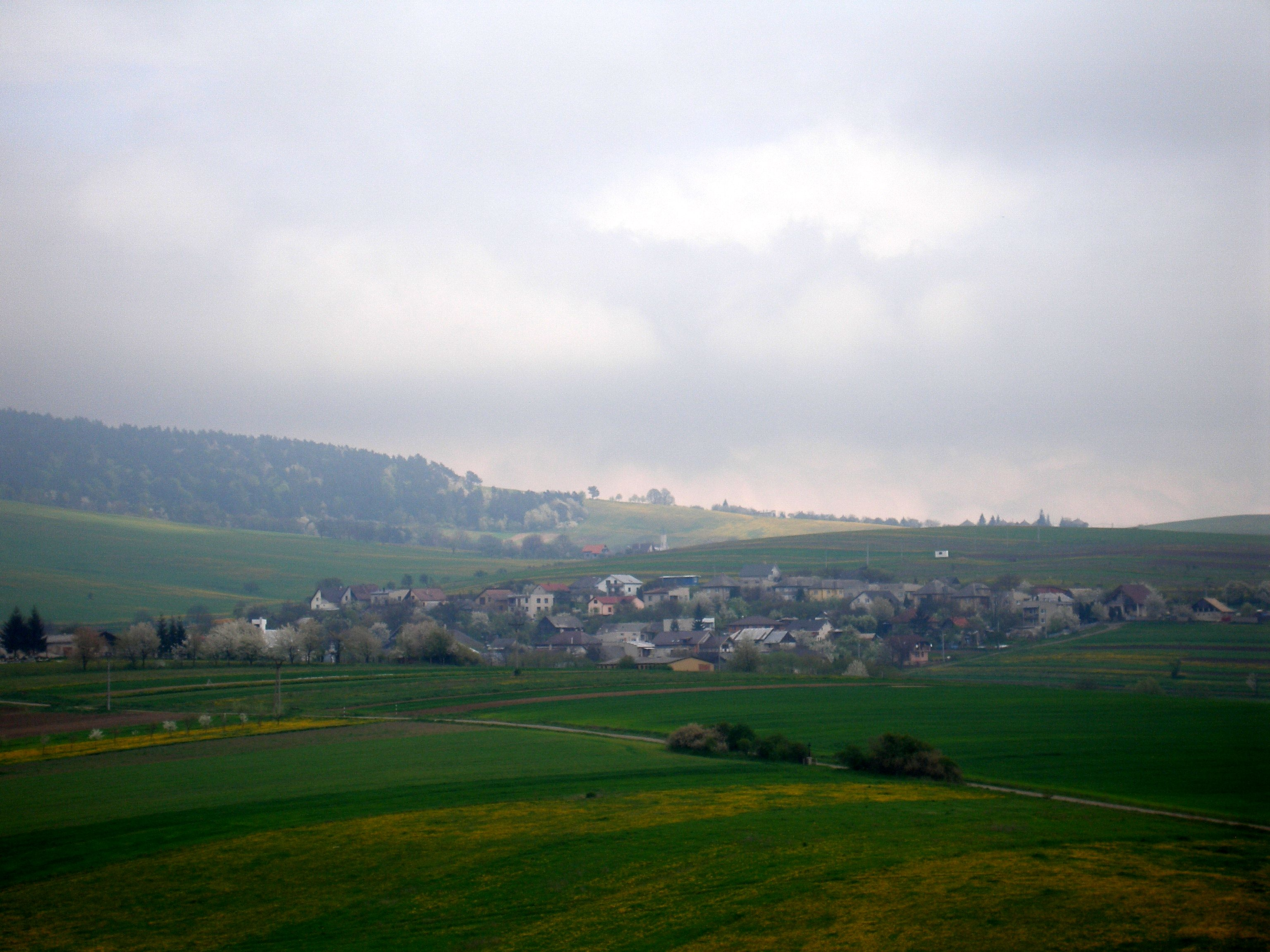 Obec Chmeľovec okres Prešov región Šariš